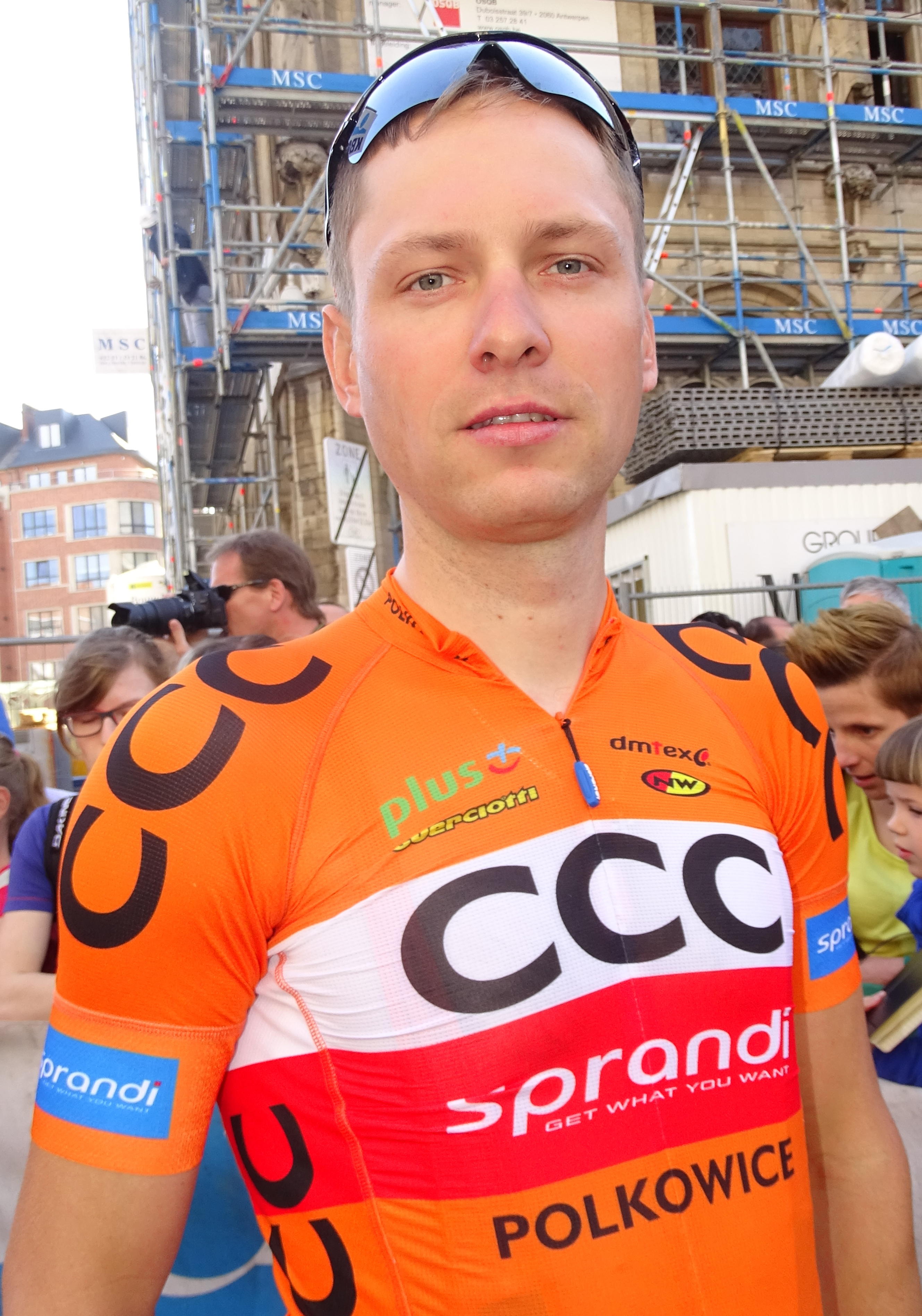 Reportage réalisé le mercredi 15 avril à l'occasion du départ de la Flèche brabançonne 2015 à Louvain, Belgique.